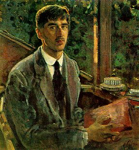 Корней Чуковский. Музей-квартира И.И.Бродского